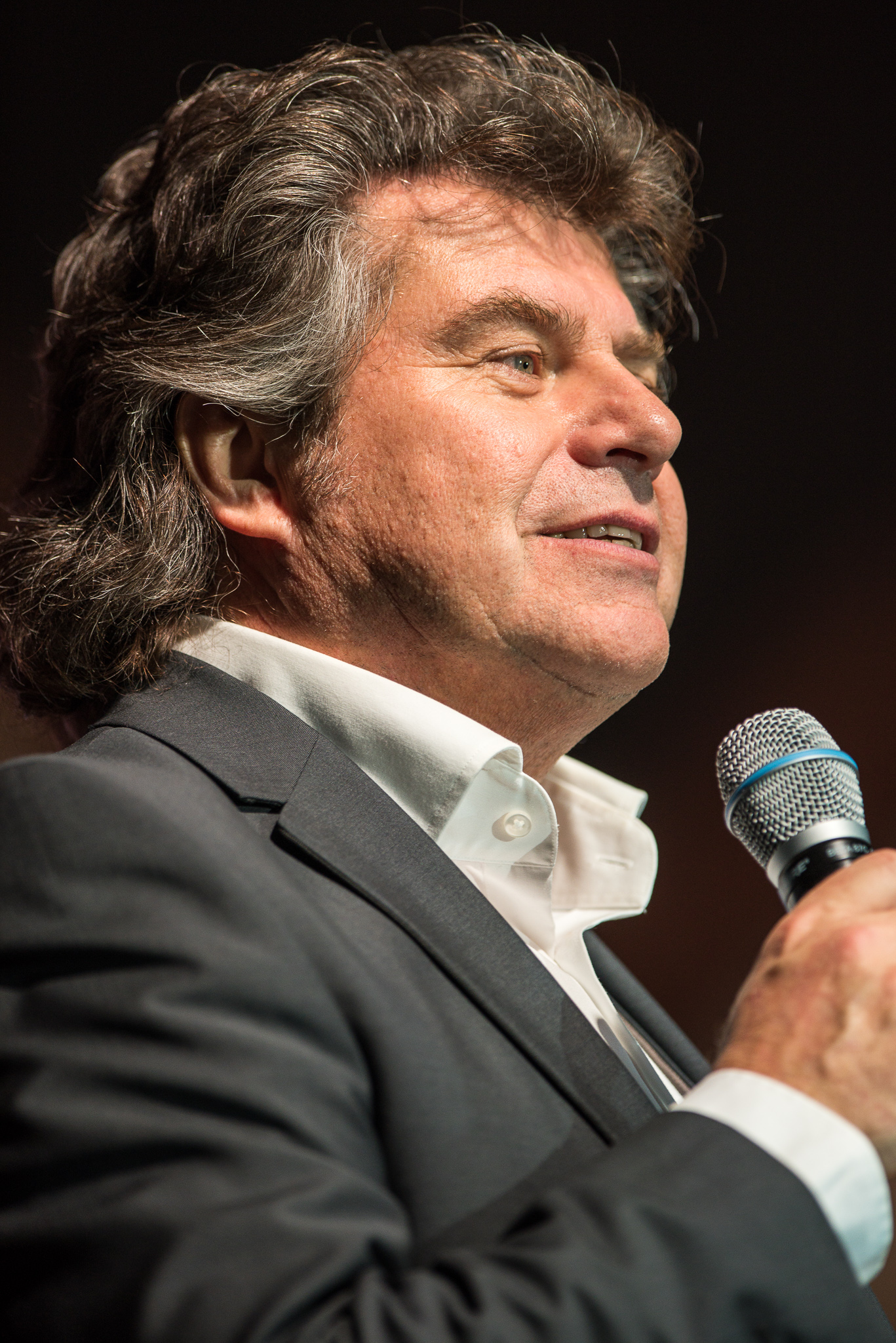 ARGO-Konzerte,Adolf Andreas Meyer,Andy Borg,Konzert,Livekonzert,Livemusik,Meistersingerhalle,Musikantenstadl,Tournee 2015